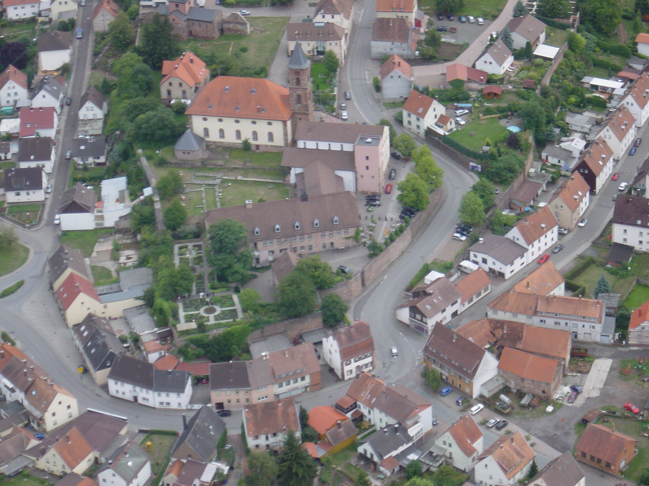 Kloster Hornbach Luftbild